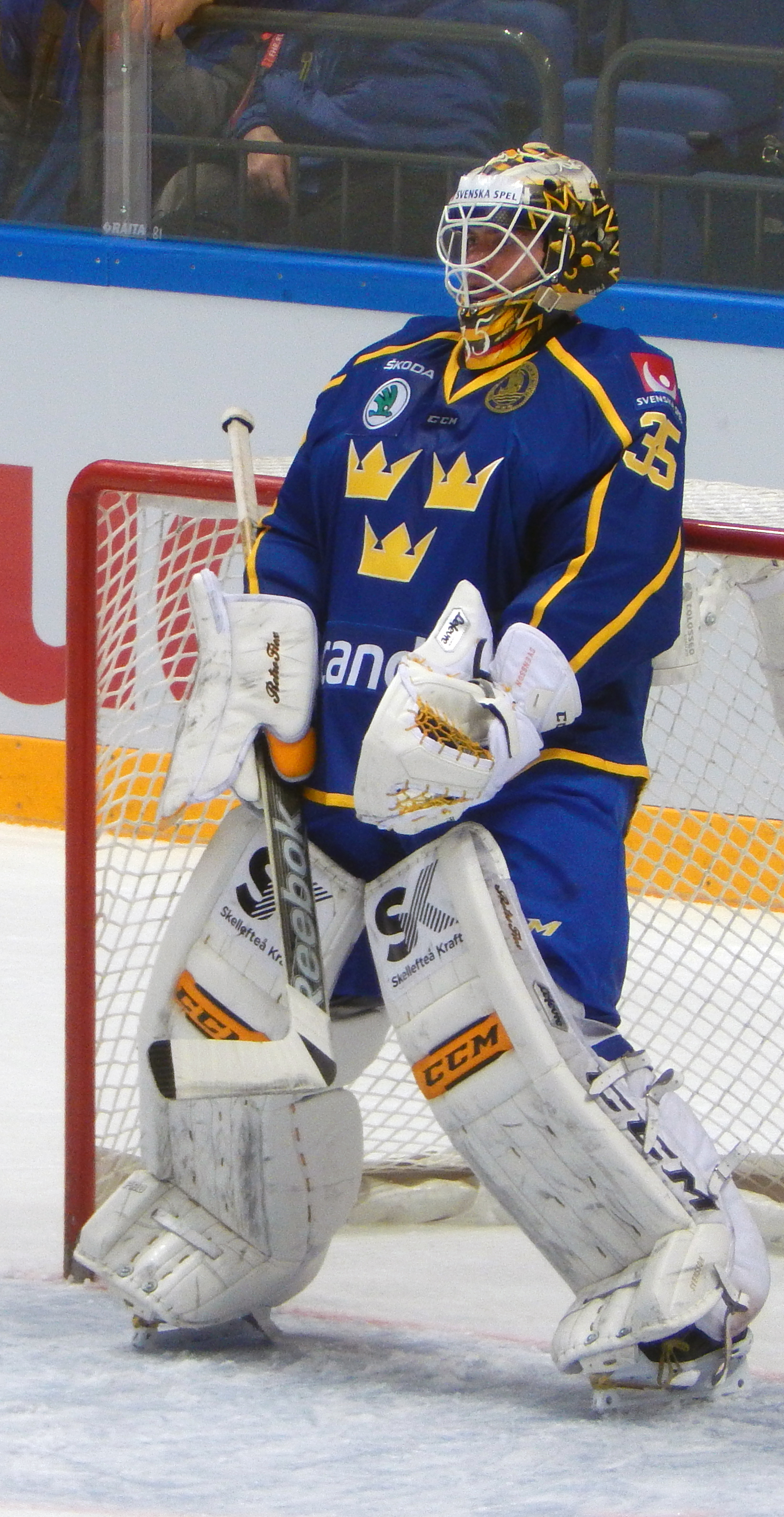 Маркус Свенссон на Кубке Первого Канала 2015 против Чехии